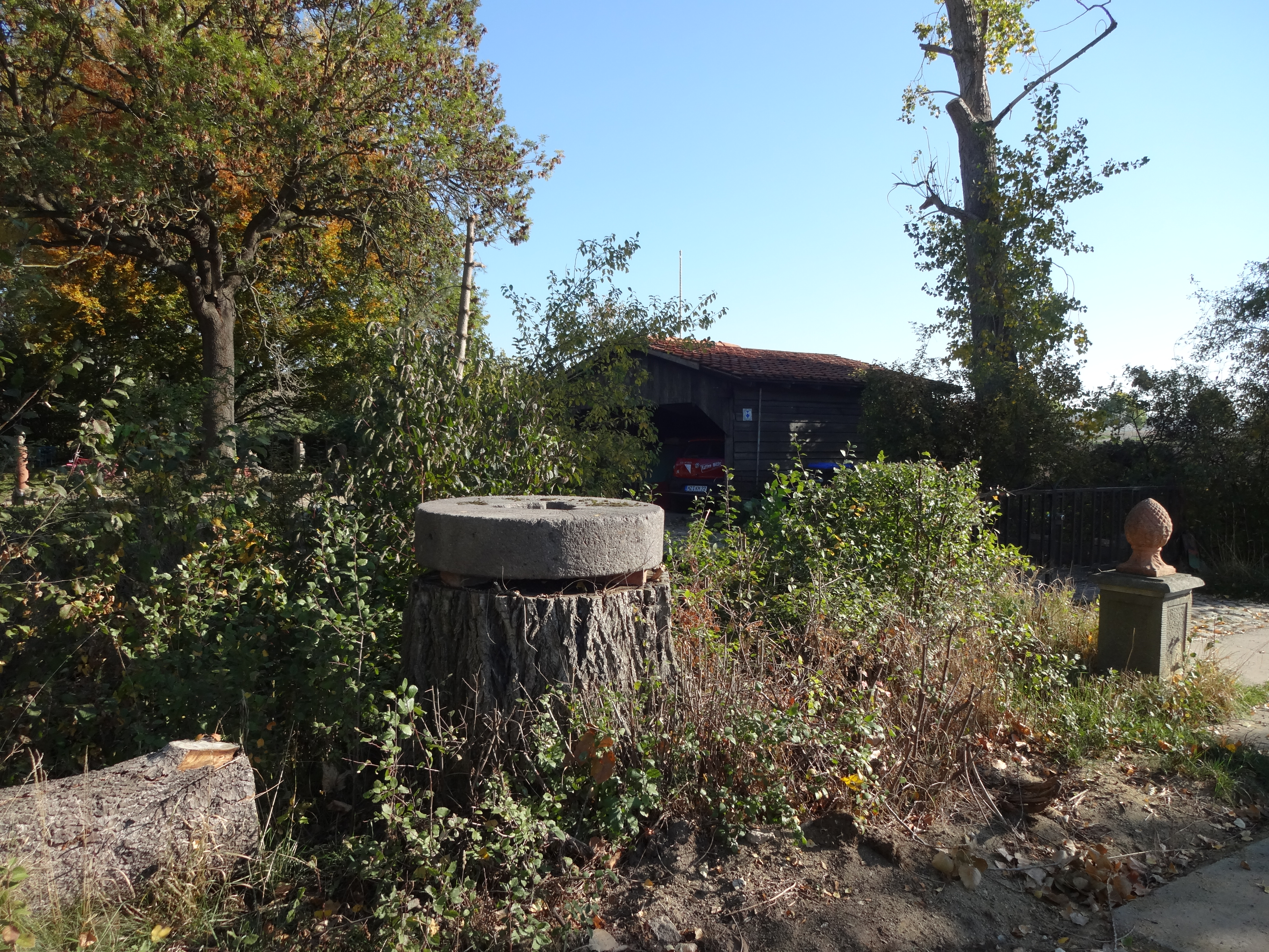 denkmalgeschütztes Mühle in der Dardesheimer Straße 114 in Zilly